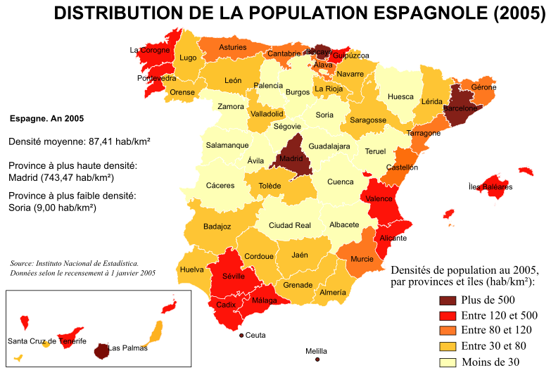 Carte de l'Espagne montrant les densités de populaton par provinces et îles, selon le recensement du 2005 élaboré par l'Instituto Nacional de Estadística. Il existe aussi une version en espagnol et une version en anglais de cette carte.